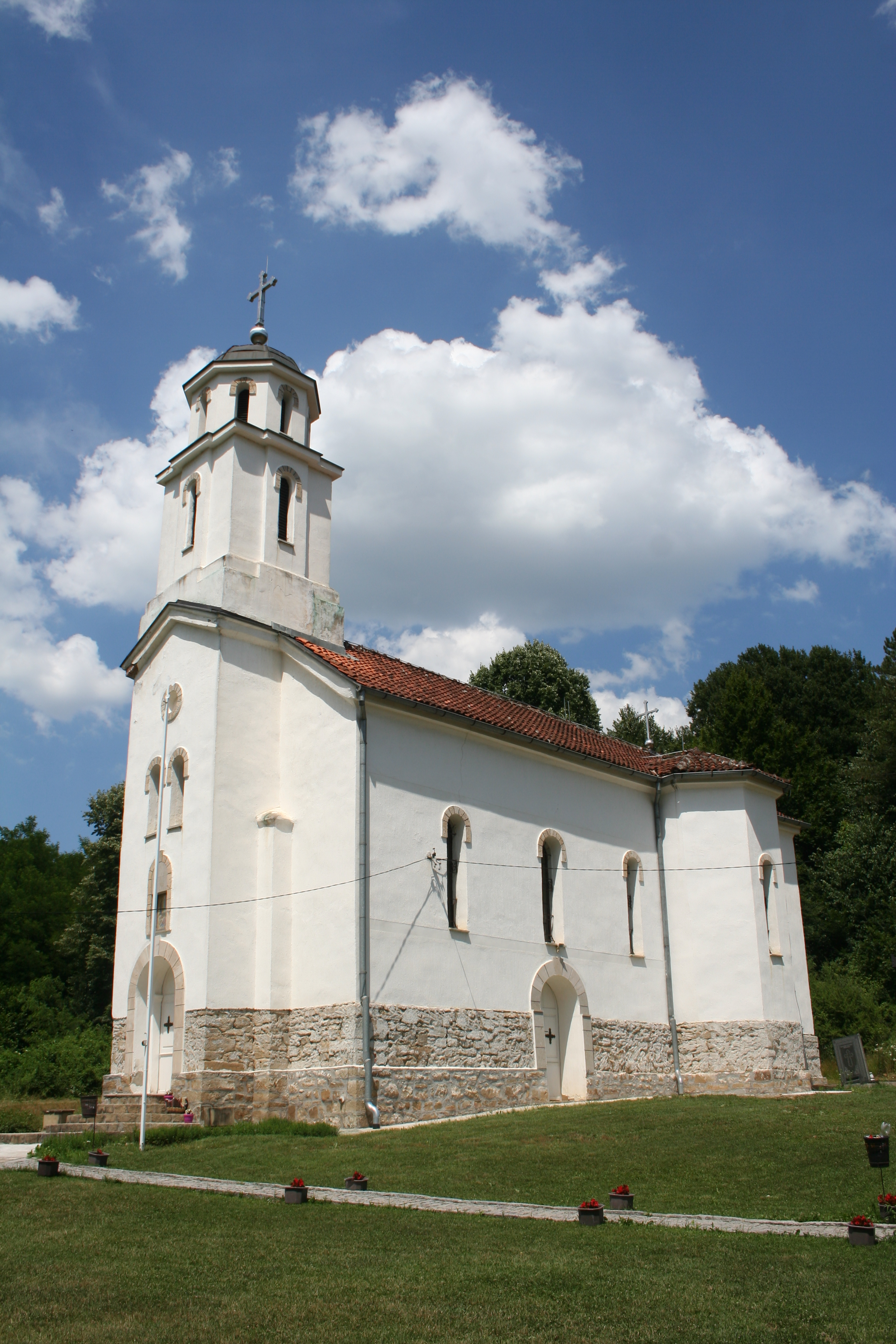 Crkva Preobraženja Gospodnjeg, Slavkovica